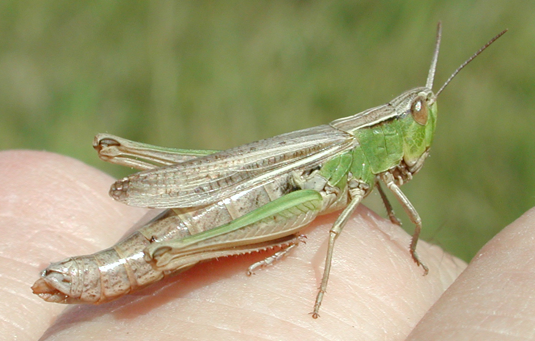 Chorthippus albomarginatus, f., weißrandiger Grashüpfer, Weibchen, Farbvariante mit grünen Seiten und grünen Hinterbeinen, NSG Kirchwerder Wiesen, Elbmarsch bei Hamburg, Deutschland